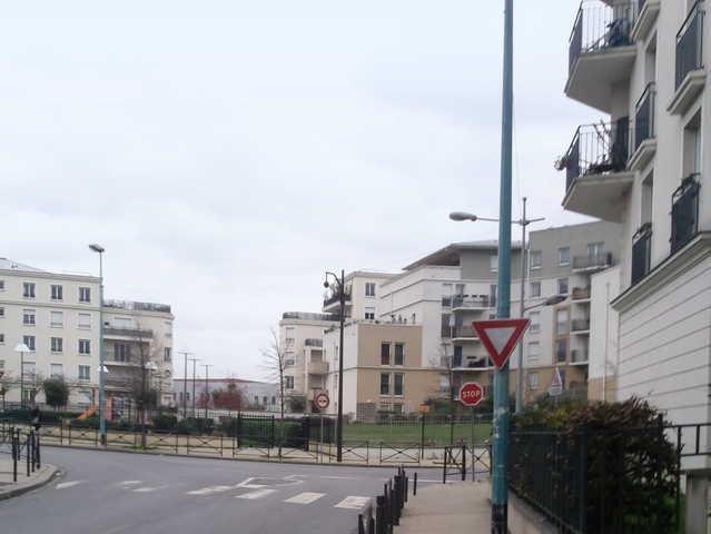 Le Bourget, quartier nouveau au fond la ZAC du Commandant Rolland et devant le petit square Little Falls.